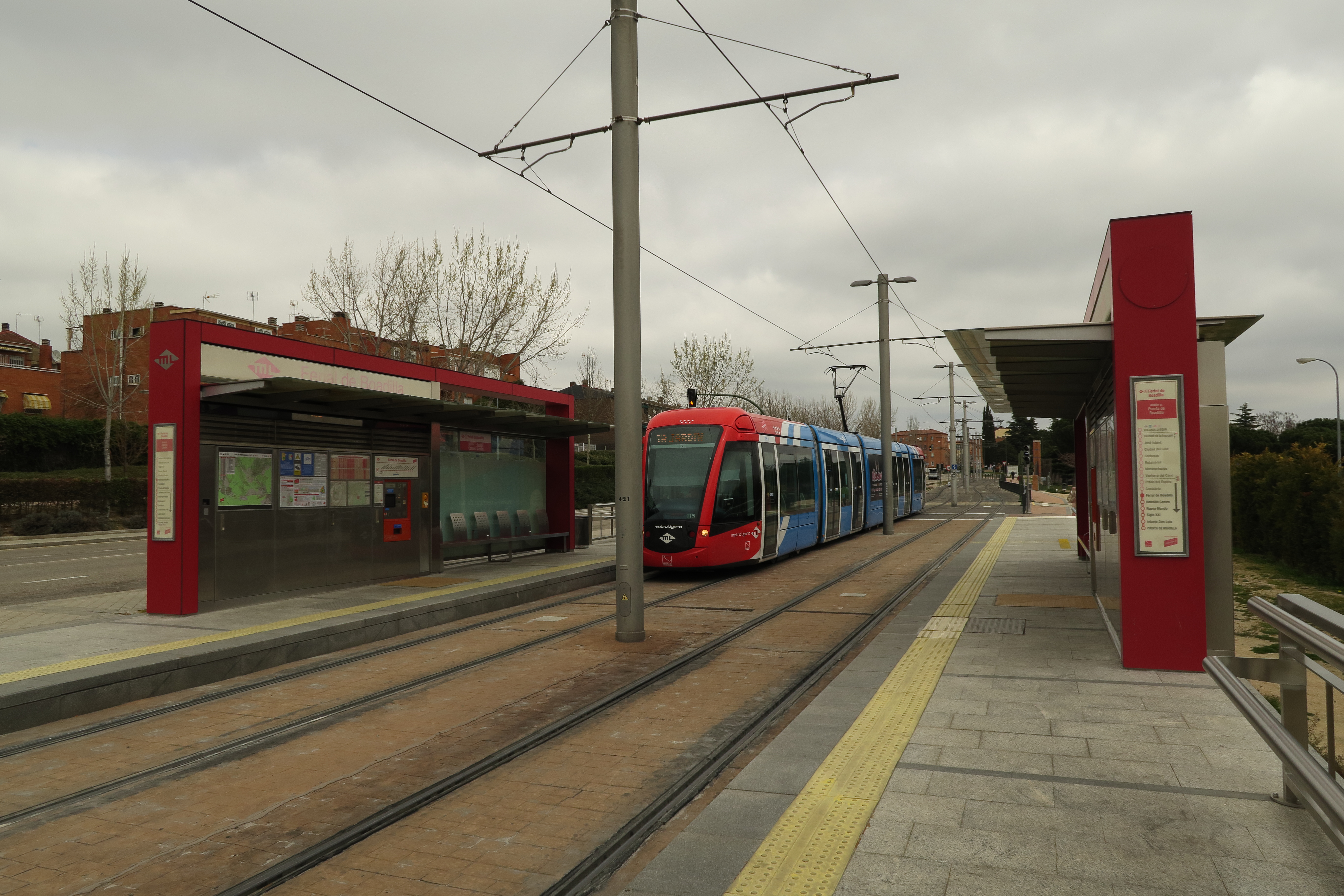 Estación de Ferial de Boadilla